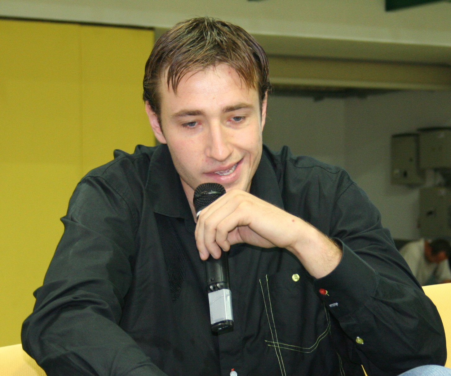 Matjaž Smodiš, Slovene basketball player / Matjaž Smodiš, slovenski košarkar